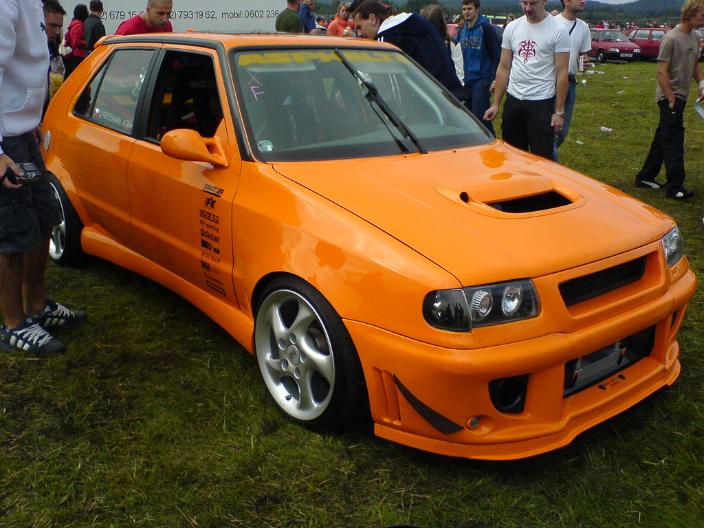 Škoda Felicia (tuning)I love orange